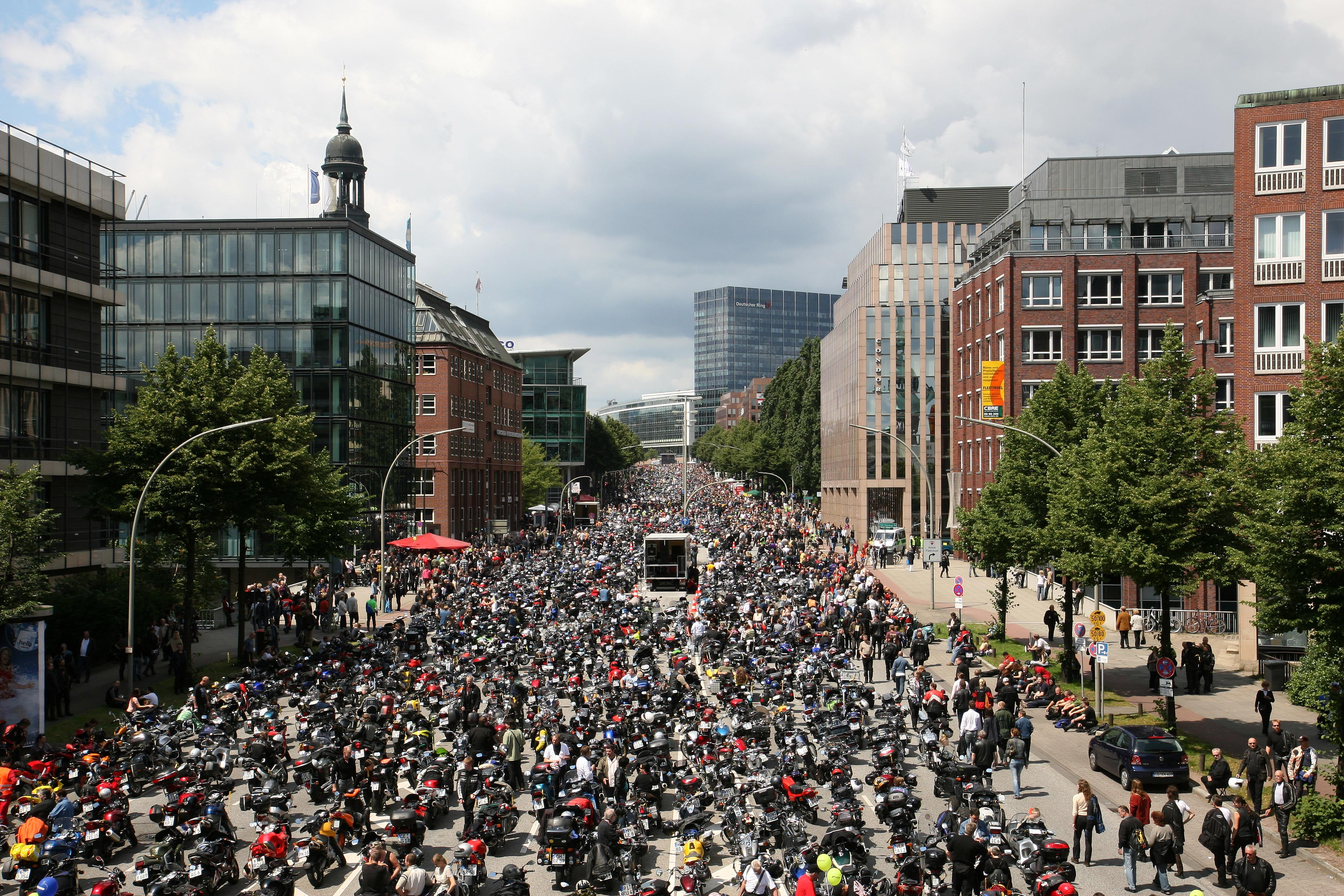 Motorradgottesdienst (MOGO) Hamburg 2007